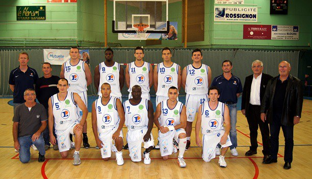 ubcmo